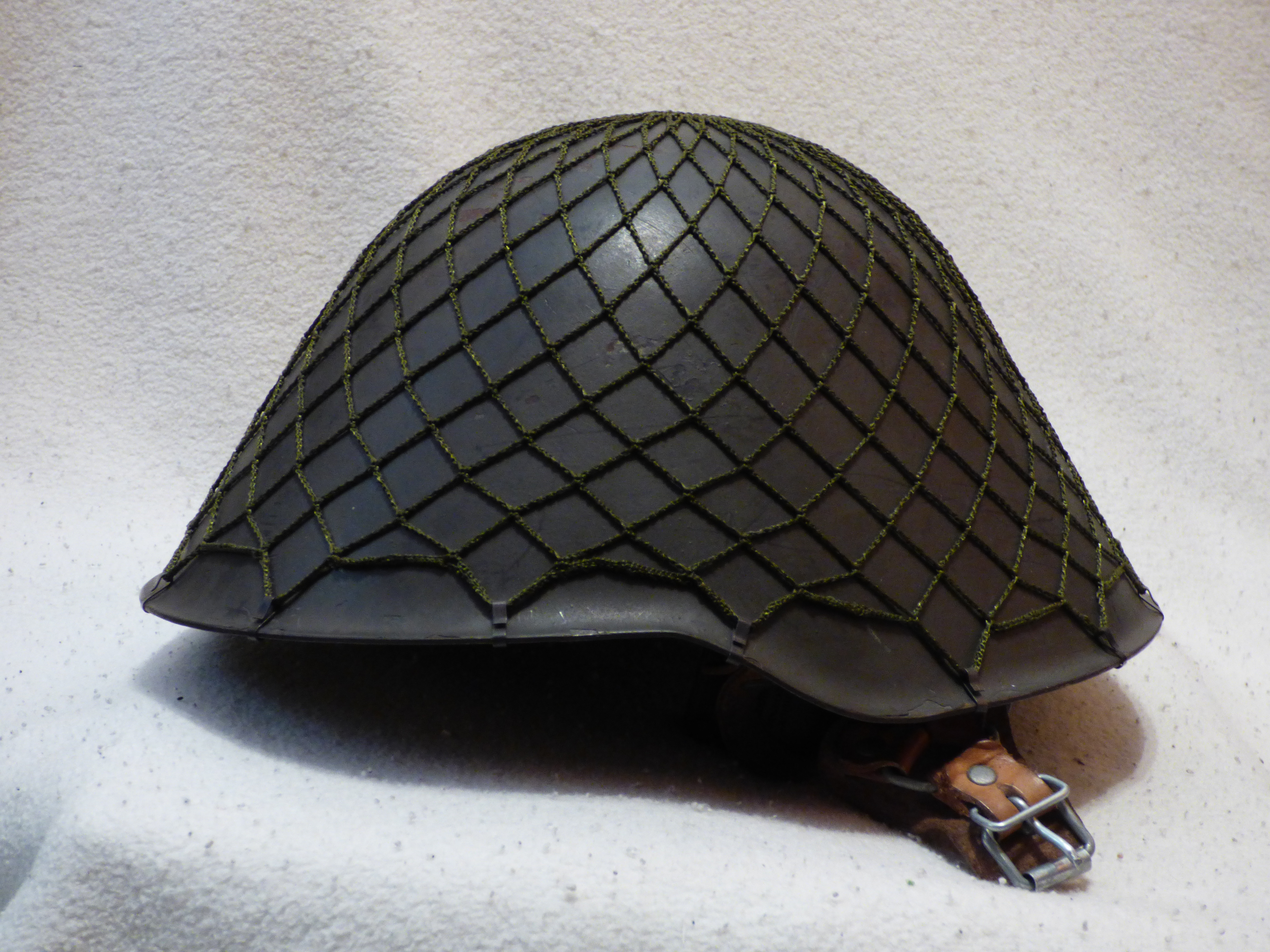 Stahlhelm M56 NVA 1970